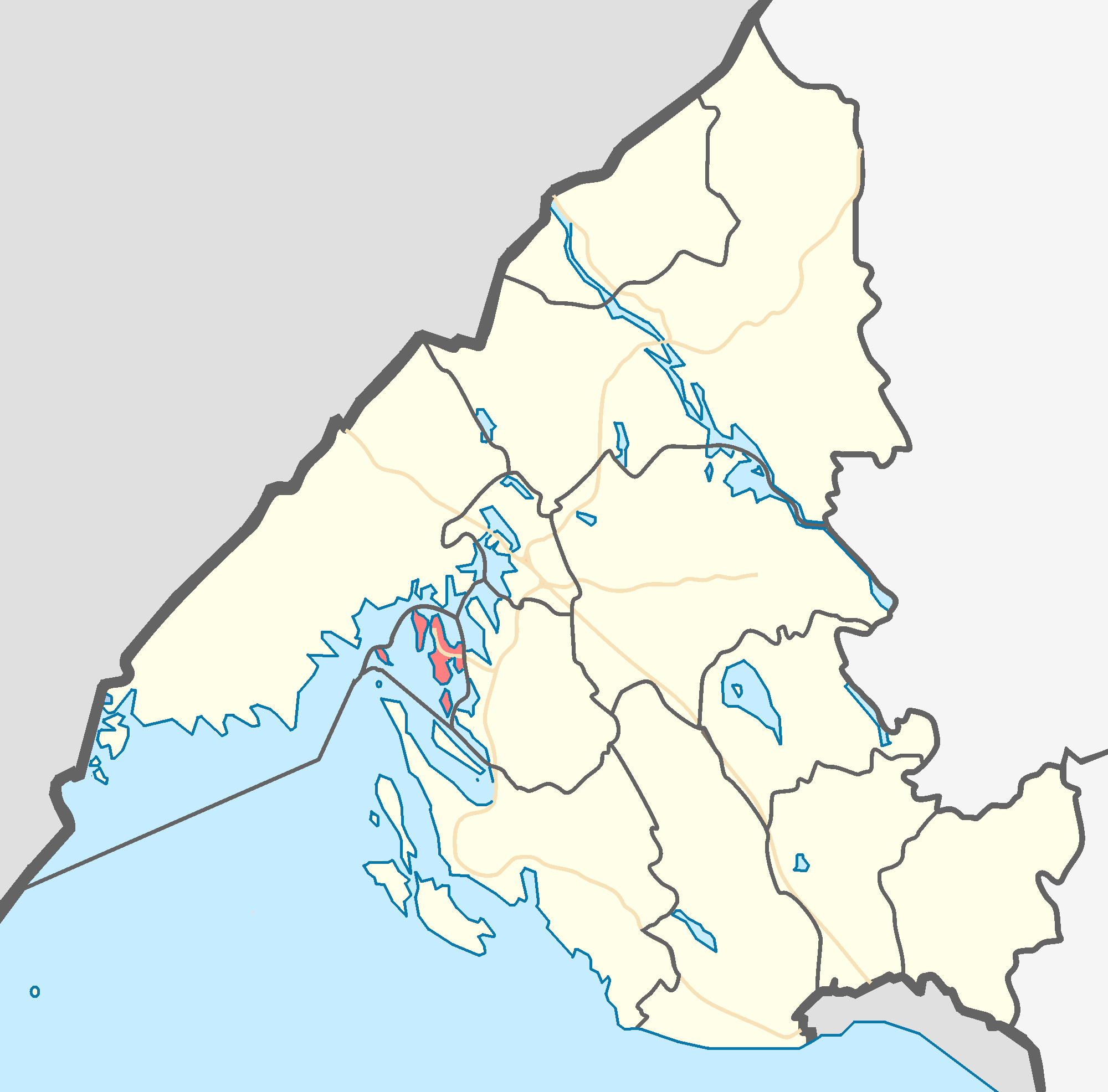 МО Высоцкое городское поселение на карте Выборгского района Ленинградской области